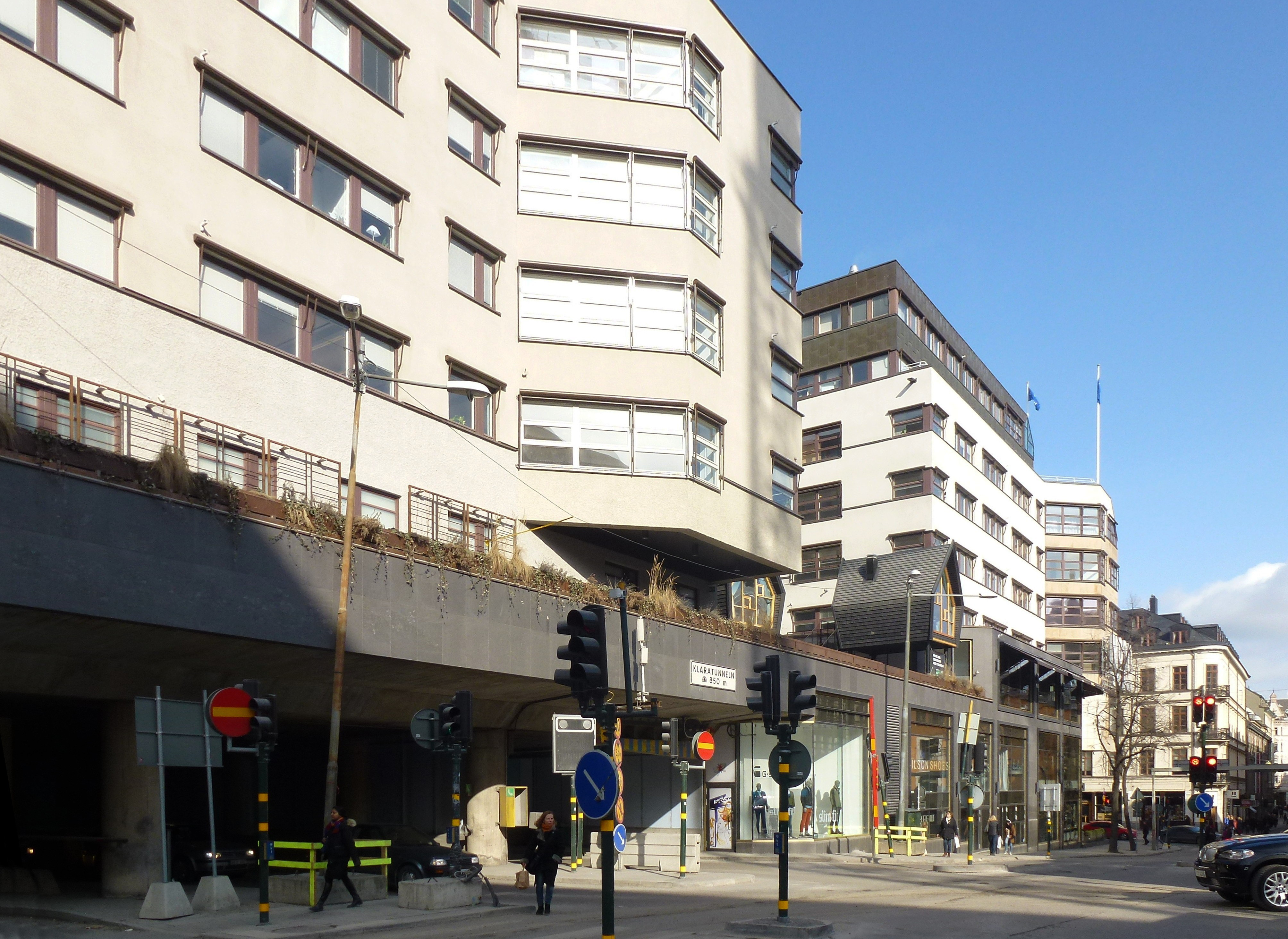 Salenhuset efter ombyggnaden 2013, fasad mot Mäster Samuelsgatan med Klaratunnelns mynning